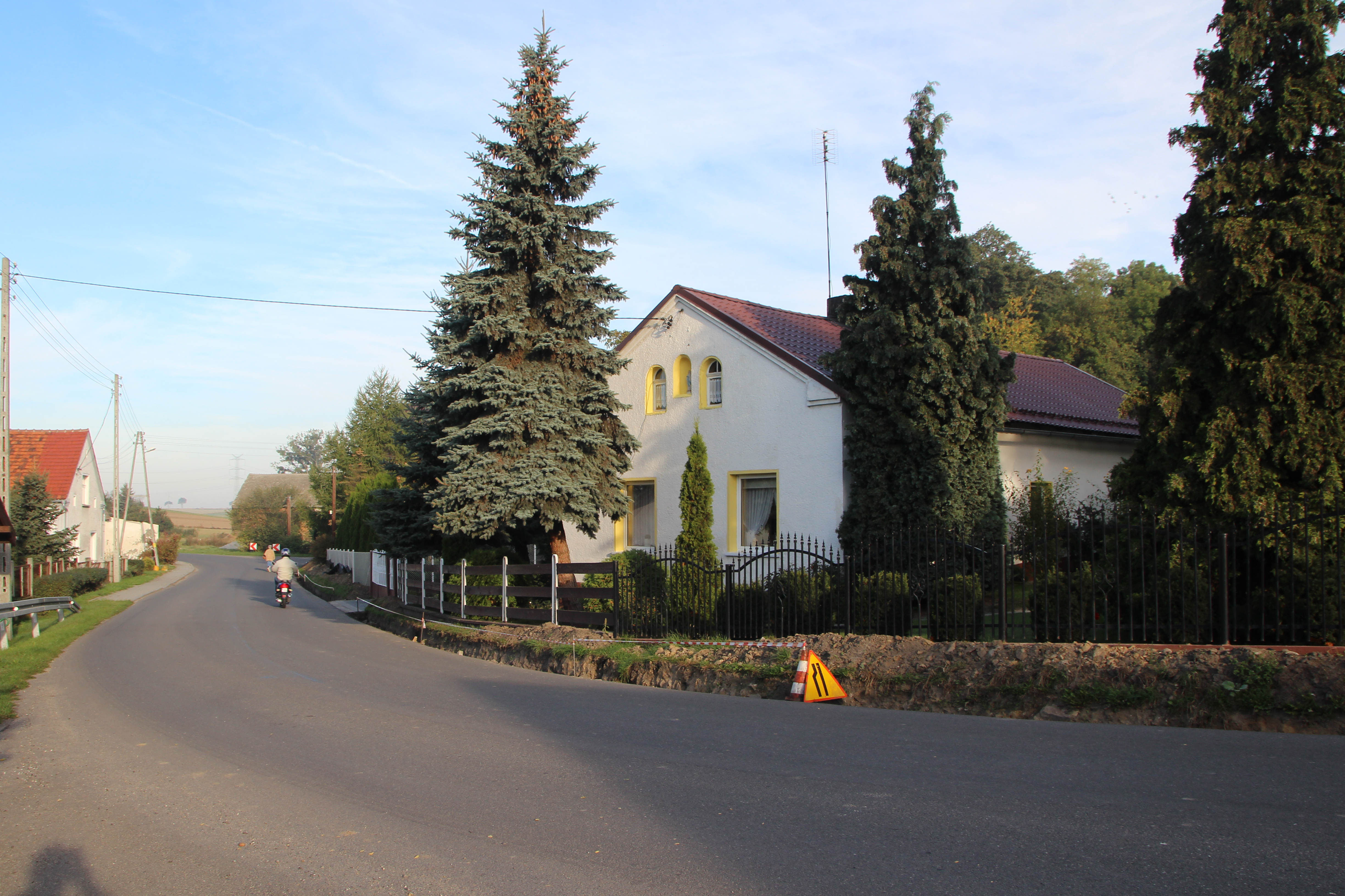 Naczysławki (dodatkowa nazwa w j. niem. Klein Nimsdorf) – wieś w Polsce w województwie opolskim, w powiecie kędzierzyńsko-kozielskim, w gminie Reńska Wieś.